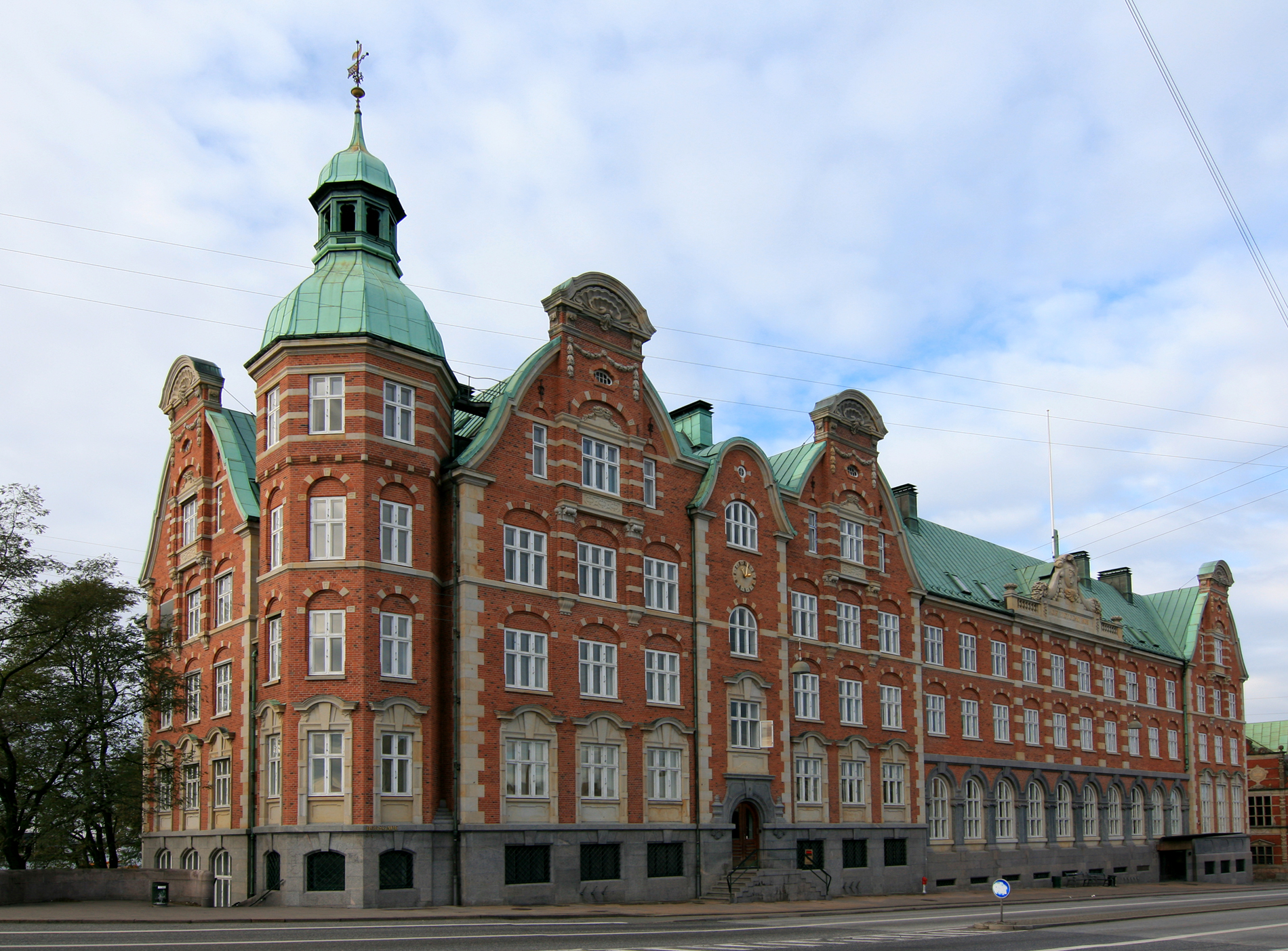 C F Tietgens Hus, Børskaj, København.